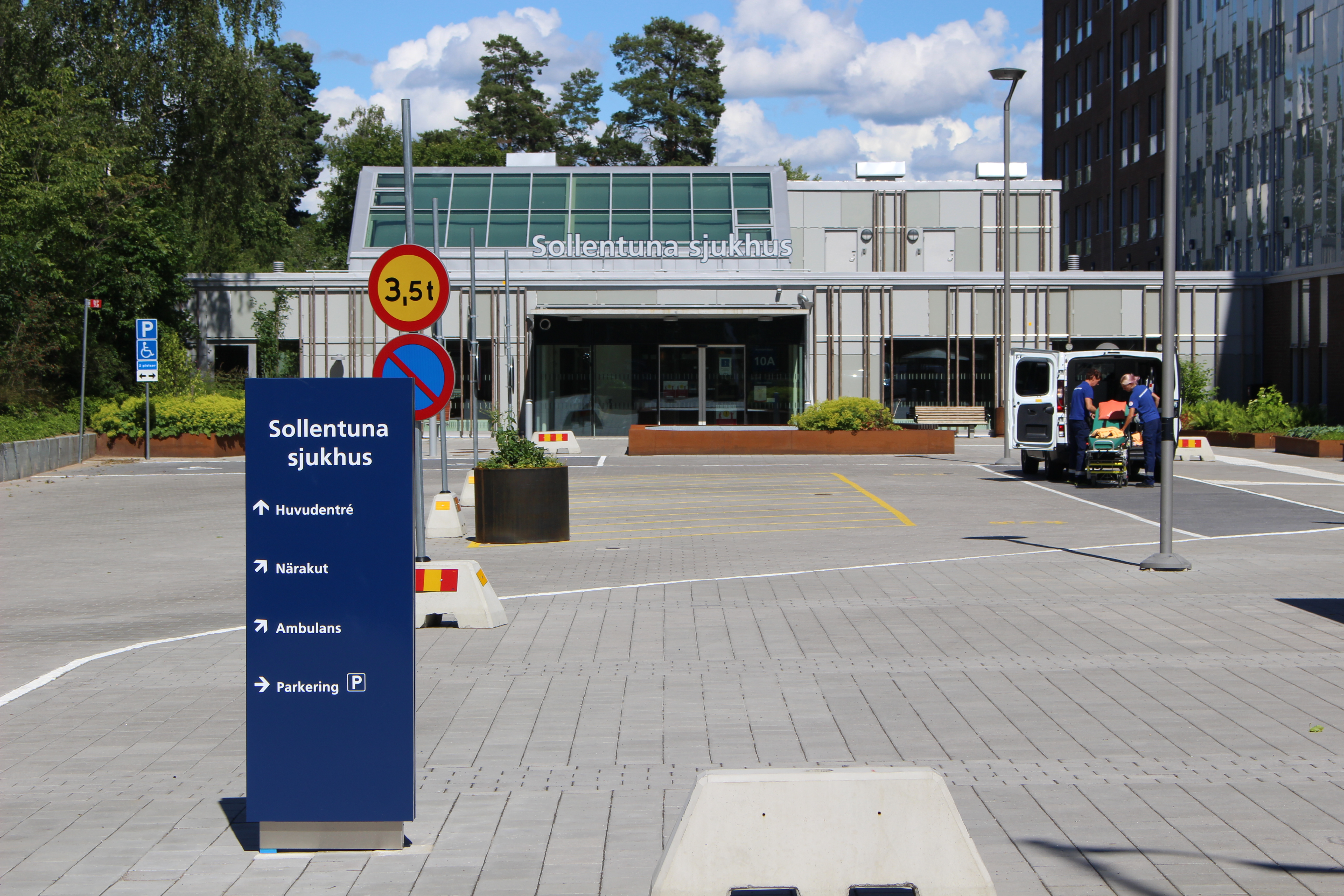 Entré till Sollentuna sjukhus.